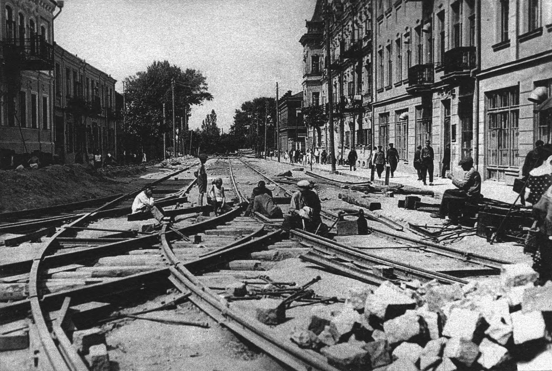 Беларуская (тарашкевіца): Менск (Miensk), вуліца Лошыцкая (vulica Łošyckaja)